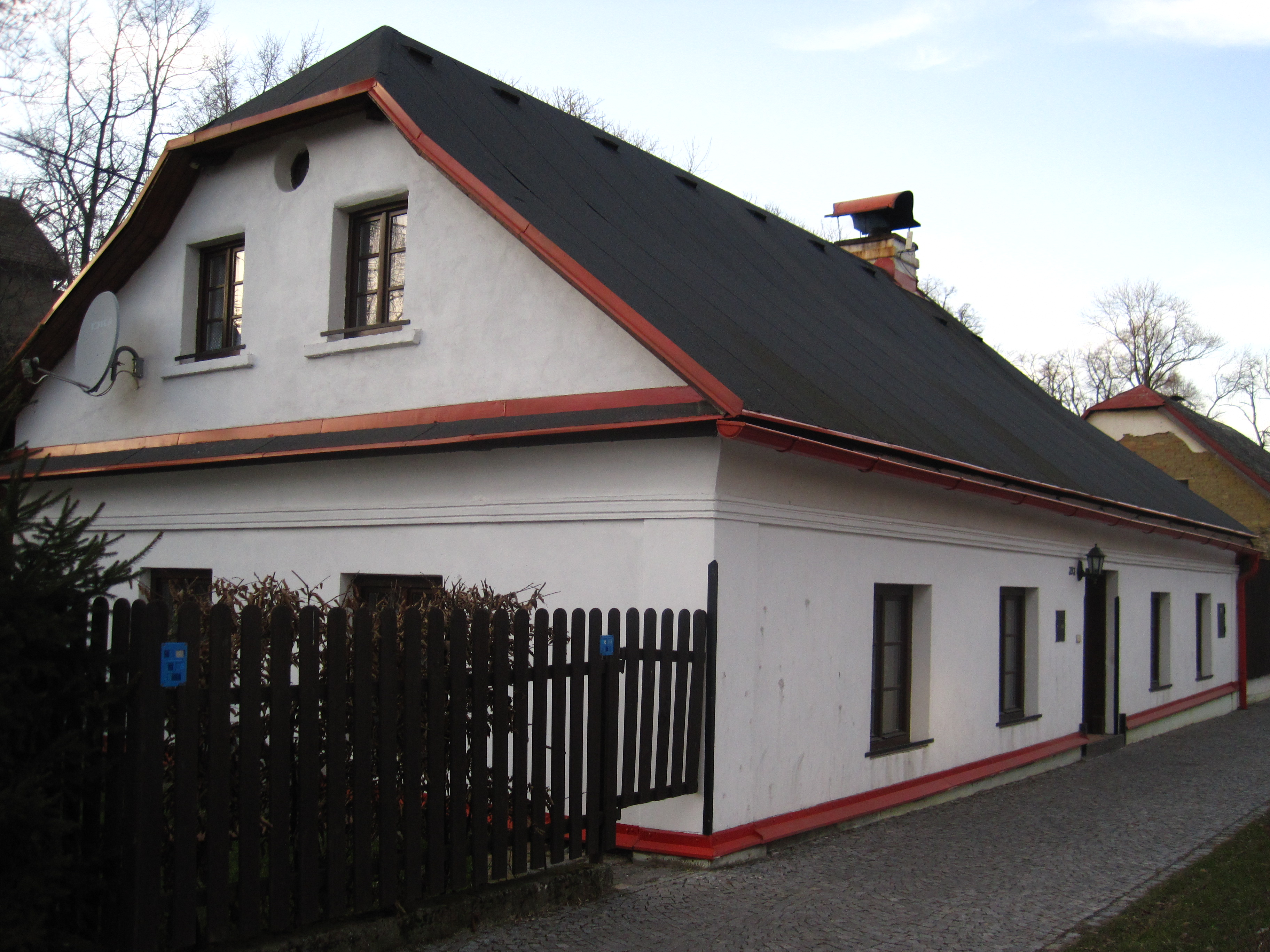 Městský dům (Chotěboř), Riegrova 393, Chotěboř, Chotěboř.